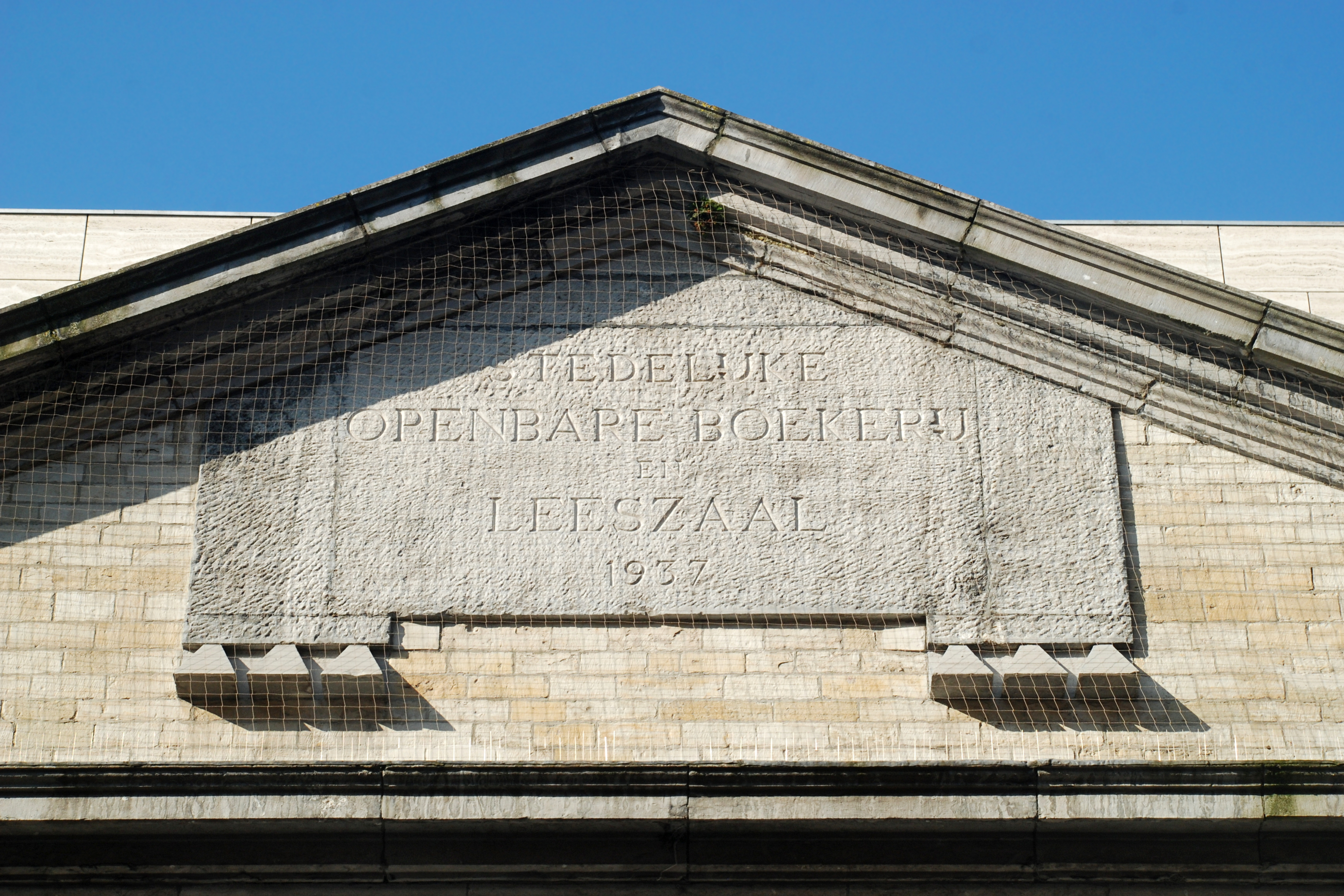 Belgique - Brabant flamand - Louvain - portail néo-classique Vicus Artium